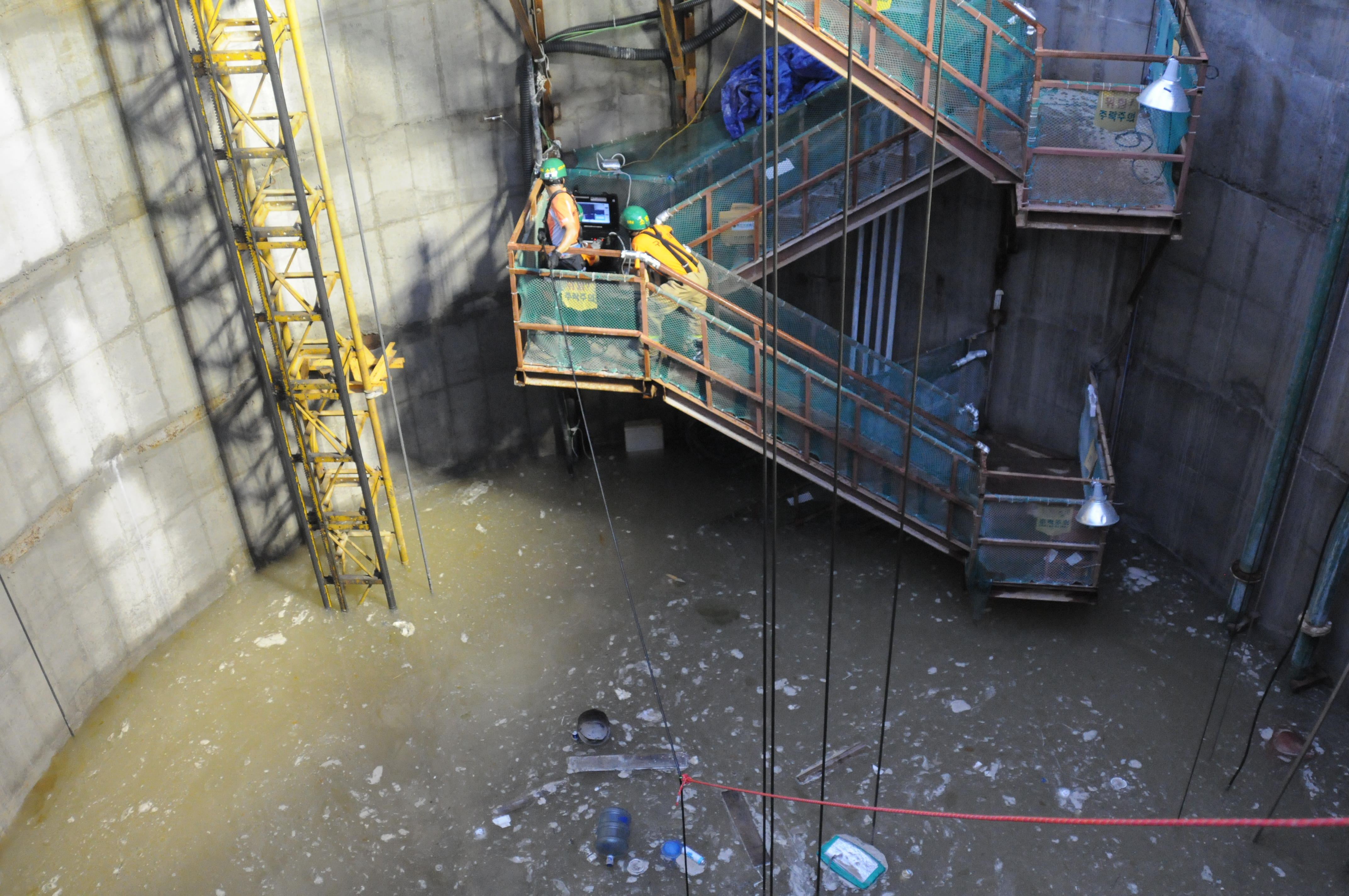 2013년 노량진 배수지 수몰 참사